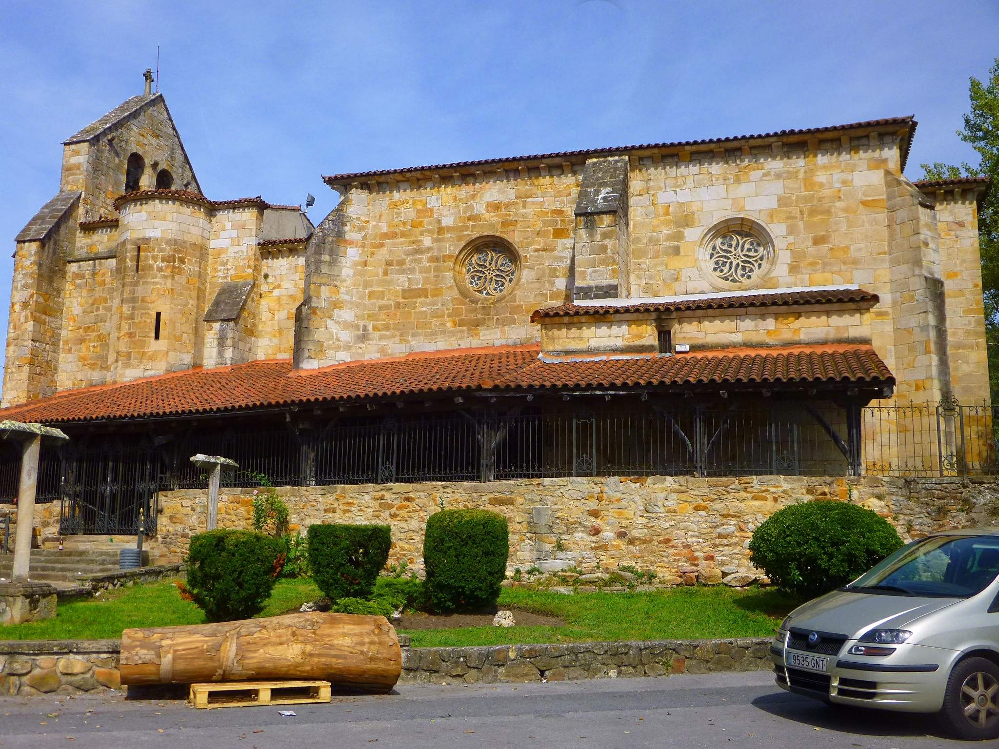 Galdácano - barrio de Elexalde, Iglesia de Andra Mari